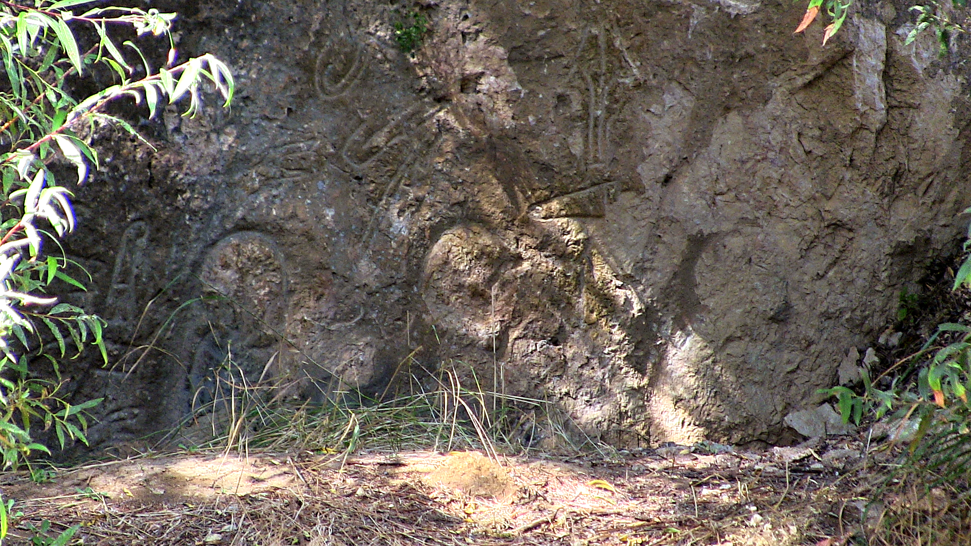 Taşçı A, hethitisches Felsrelief nahe Develi, Zentraltürkei